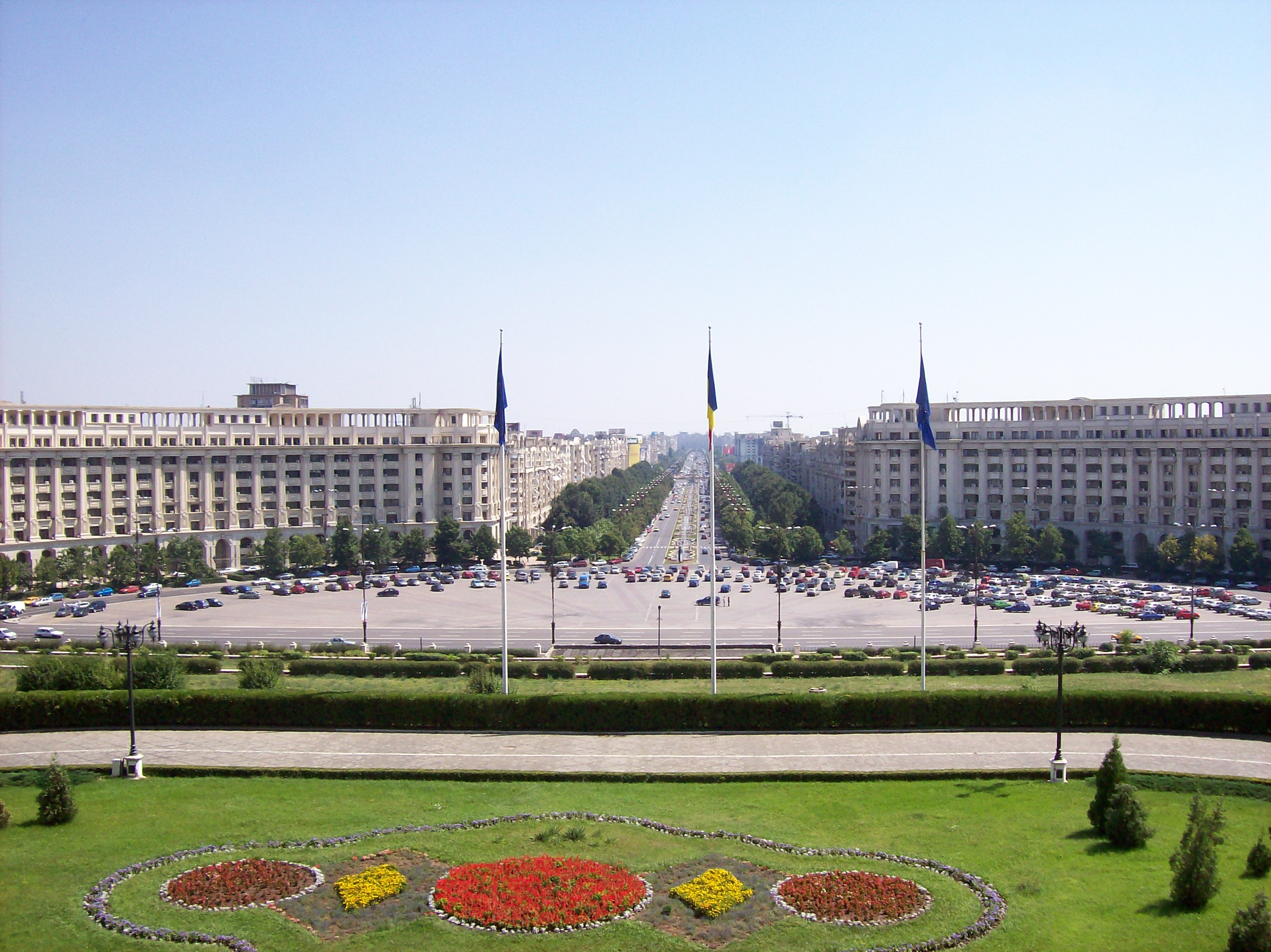 Boulevard Unirii, gezien vanaf het Parlementspaleis, deel van Ceauşescu's systematizatie, foto 2006 Licensing Categorie:Afbeelding Roemenië